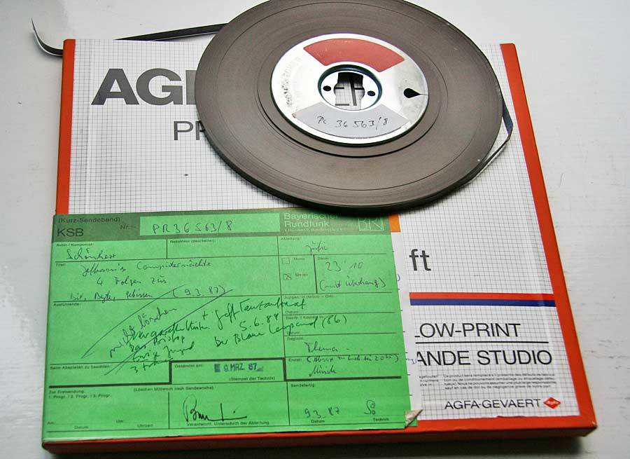 Bayerischer Rundfunk, Sendeband, Bit, byte, gebissen